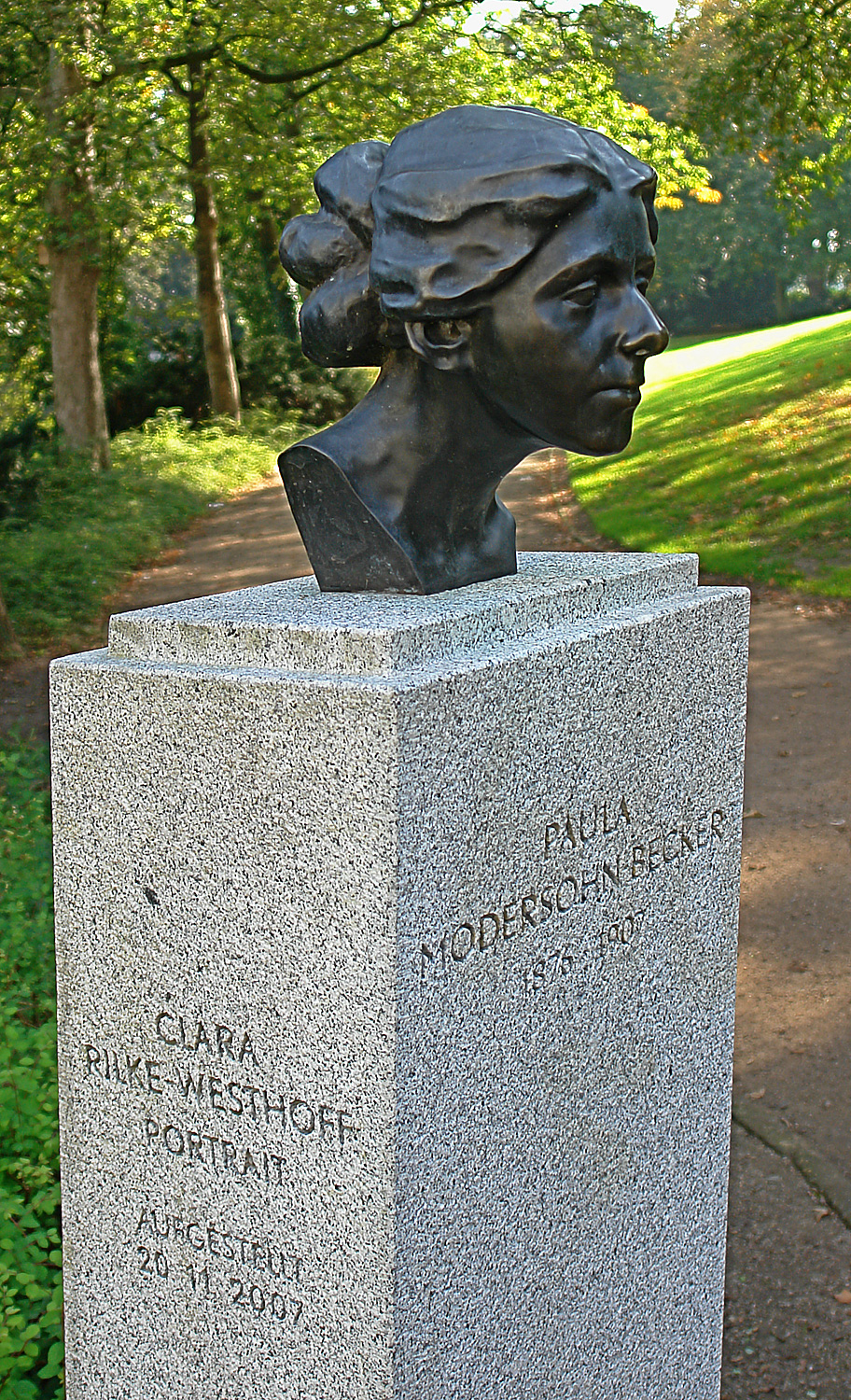 Denkmal Paula Modersohn-Becker - Bremen, Wallanlagen. Bronzeabguss der Büste, die die Bildhauerin Clara Westhoff 1899 schuf. Material: Bronze, Steinsockel. Errichtet: 2007 zum 100. Todestag von Paula Modersohn-Becker. Kunst im öffentlichen Raum – ein Bremer Programm k: kunst im öffentlichen raum bremen